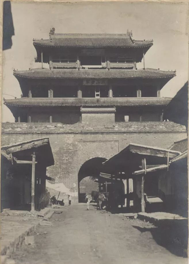 中国河北省遵化市古城北门老照片，来源称此照片摄于1932年